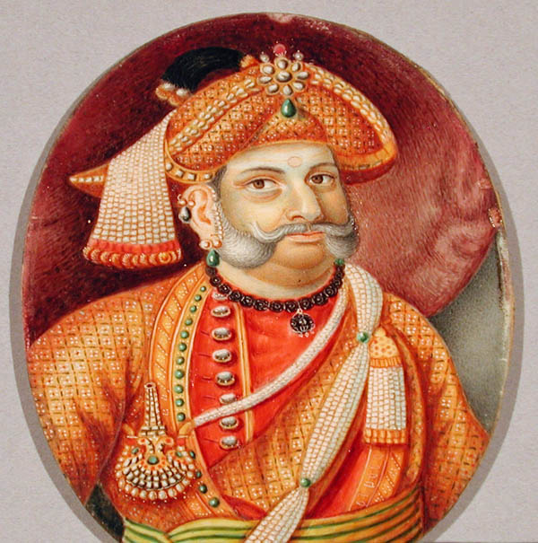 Oval portrait of Sarabhoji II Raja of Tanjore